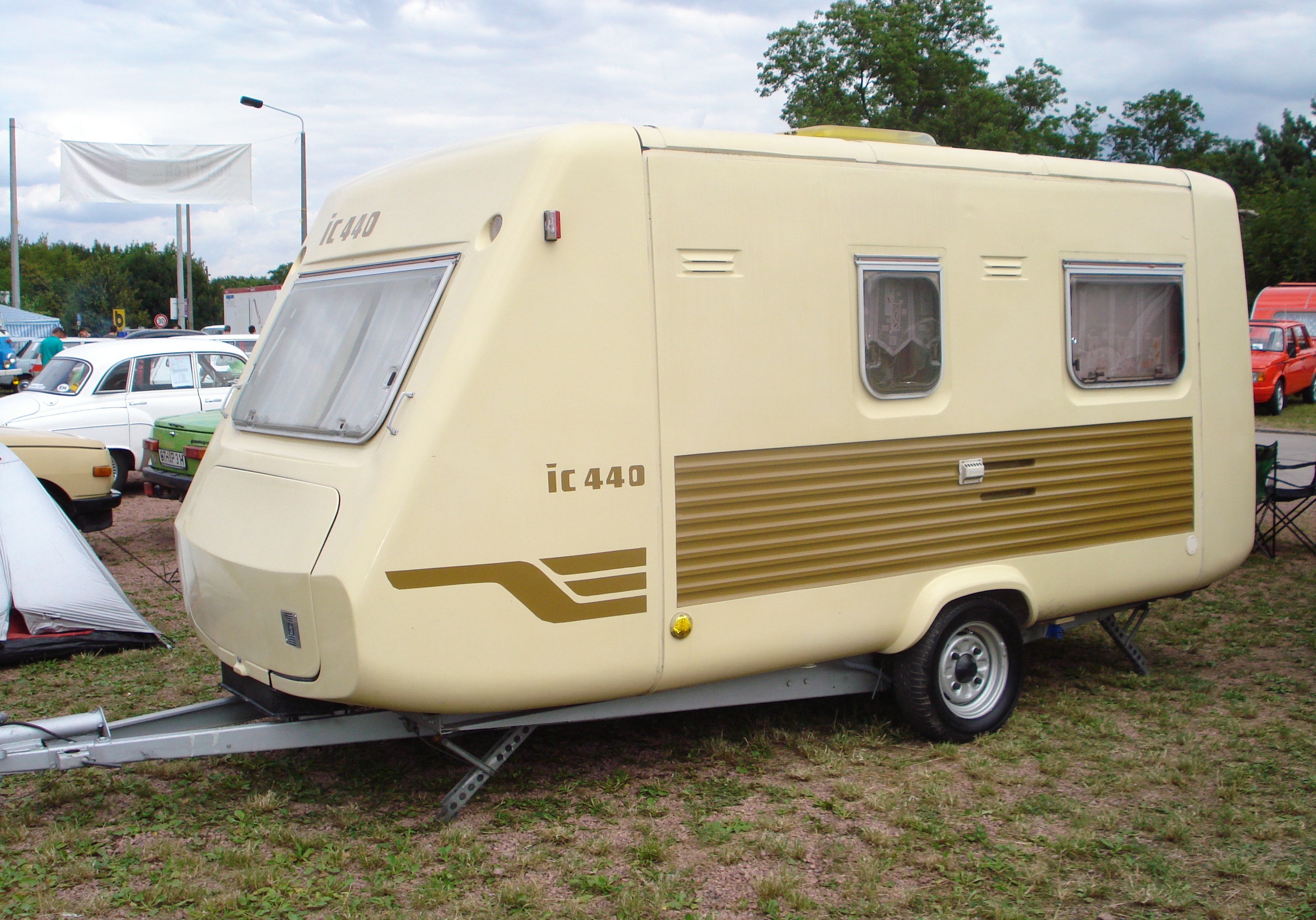 Intercamp 440 - VEB Oberlausitzer Stahl- und Fahrzeugbau, Georgewitz-Bellwitz, DDR